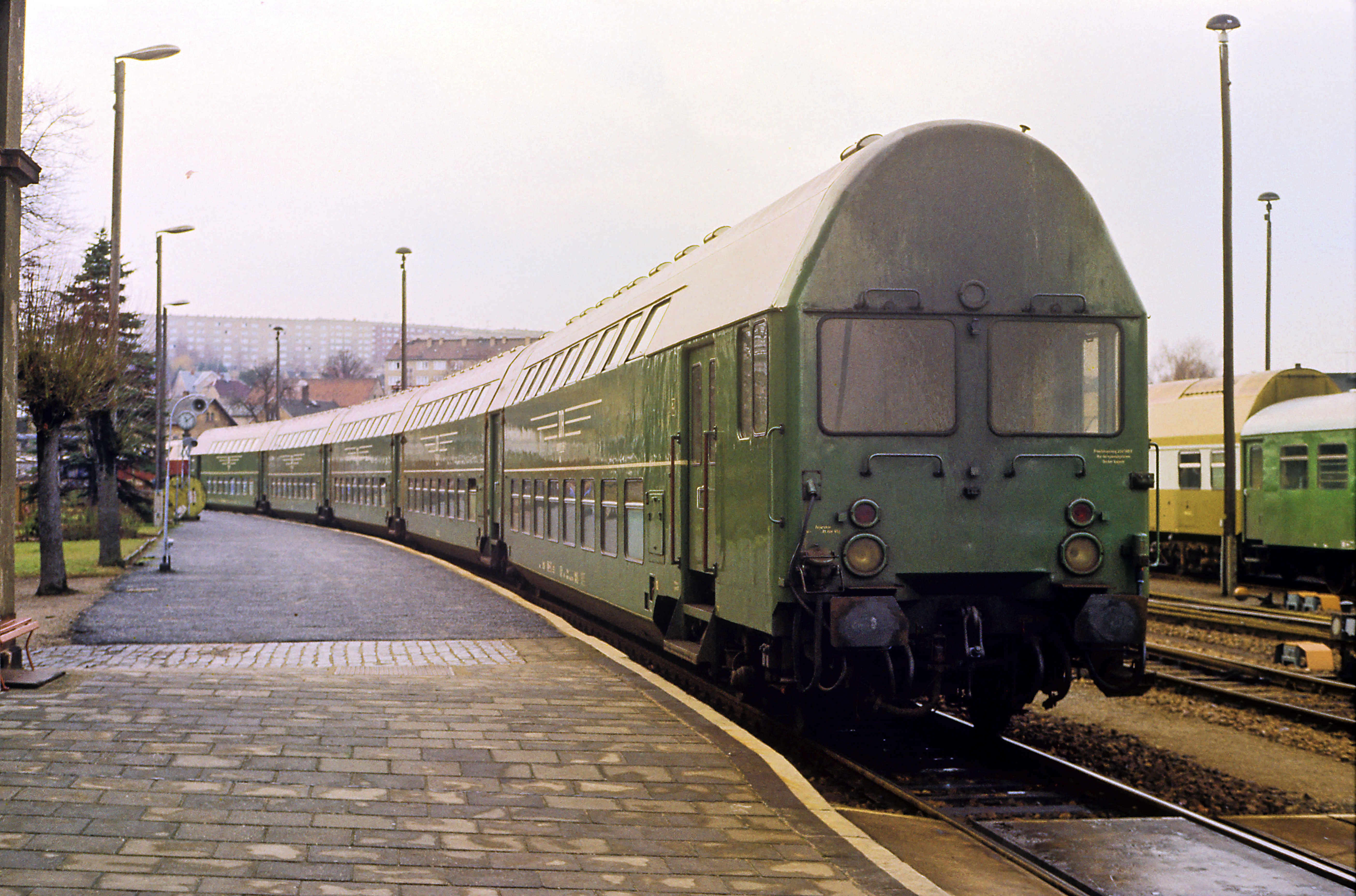 Doppelstockgliederzug Bauart 1971 mit Wendezugsteuerung (DGBgqe). Diese ist zum Zeitpunkt der Aufnahme bereits außer Betrieb, erkennbar am fehlenden orangen Kontraststreifen zwischen den Scheinwerfern sowie an den ebenfalls fehlenden Scheibenwischern.